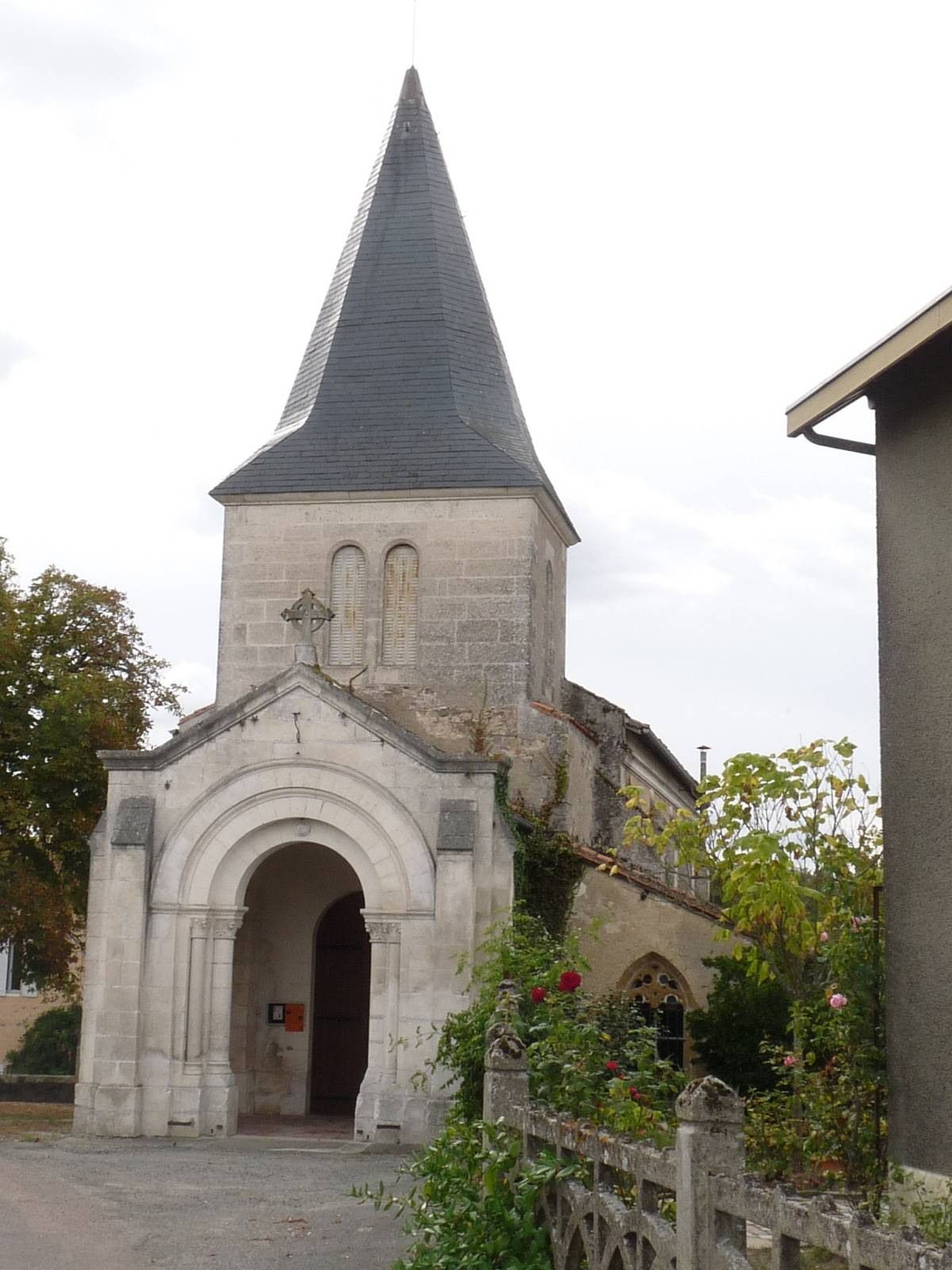 église d'Hiesse (prieuré Saint-Liphard), Charente, France